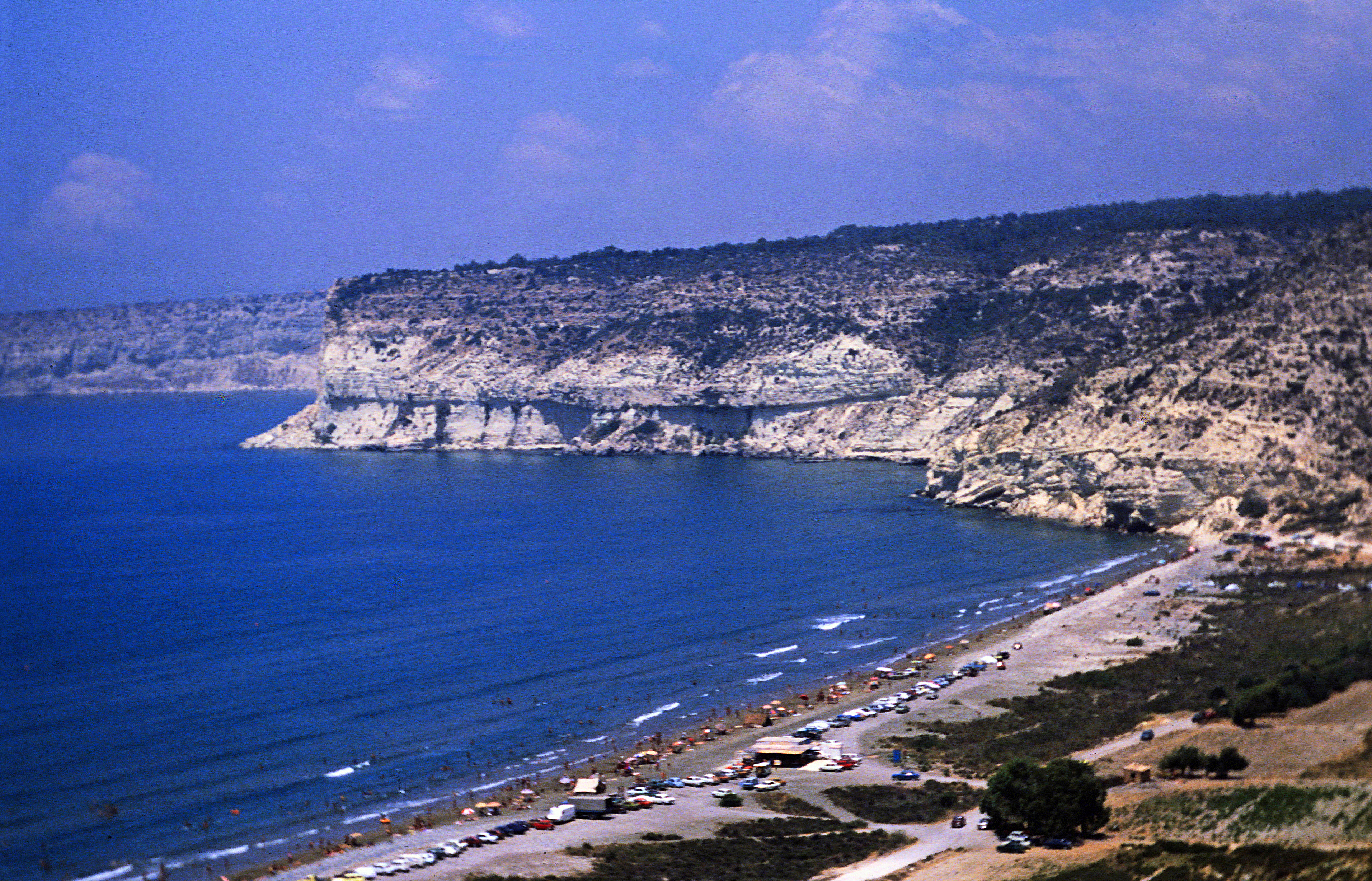 Westlich gesehen von Kourion der Strand und die Küste der Episkopi Bucht, Zypern